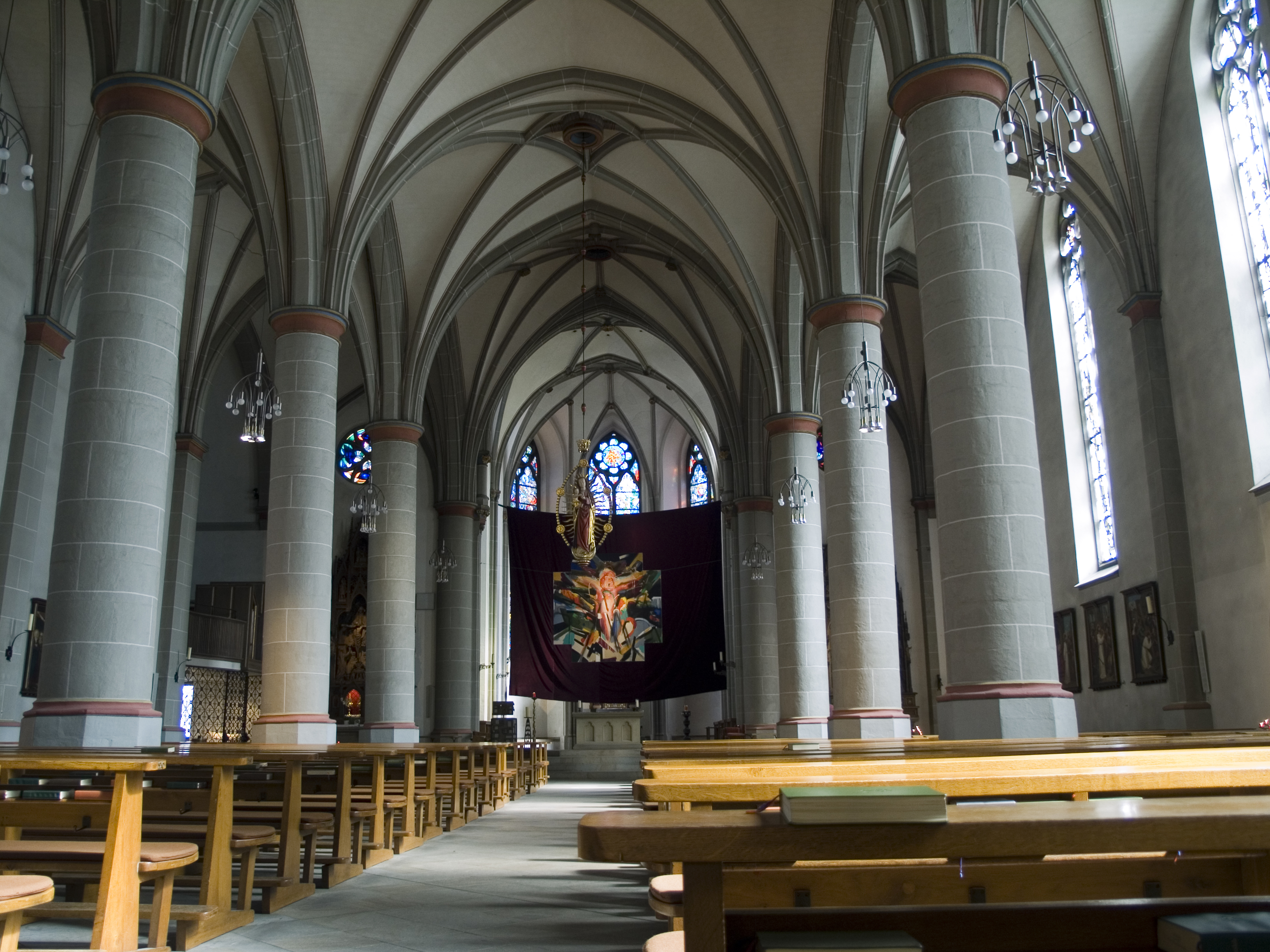 Северный Рейн - Вестфалия, Бохум - церковь Петра и Павла